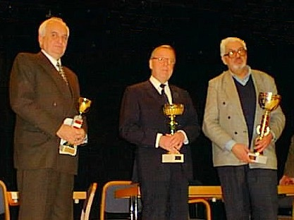 Siegerehrung, 8. Weltmeisterschaft der Senioren vom 8. bis 21. November 1998 in Grieskirchen / Österreich. Von links nach rechts: Borislav Ivkov (3.), Wolfgang Uhlmann (2.) und Wladimir Bagirow (1.).